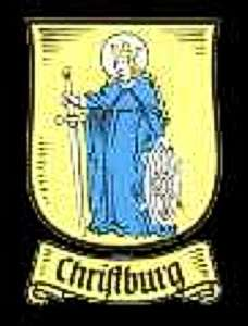 Dzierzgoń coat of arms